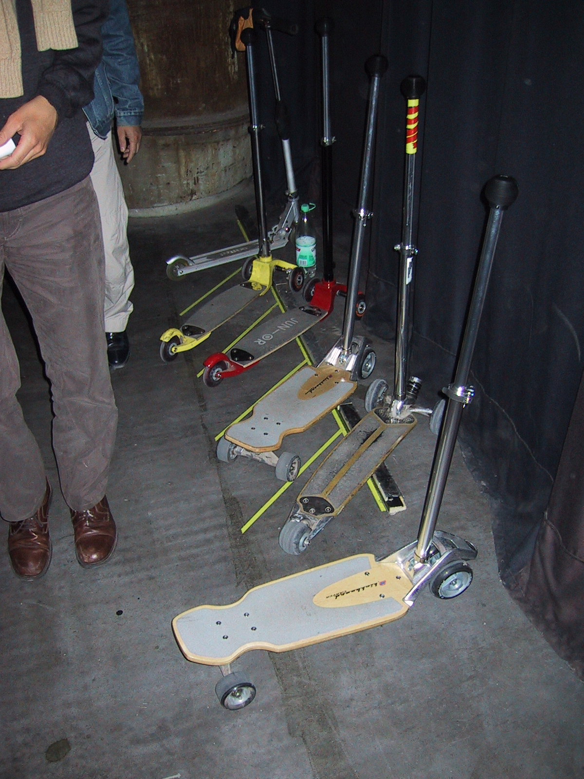 Moderne Kickboards für Erwachsenen, hier Fortbewegungshilfen von Stagehands bei einer Aufführung der RuhrTriennale in der sehr großen Jahrhunderthalle Bochum : Modern kick scooters, used by stagehands at an event of the RuhrTriennale in the Jahrhunderthalle in Bochum Source: own work Date: 04 Sept, 2003, Bochum, Germany Author: Maschinenjunge Licence: GFDL, cc-by 3.0